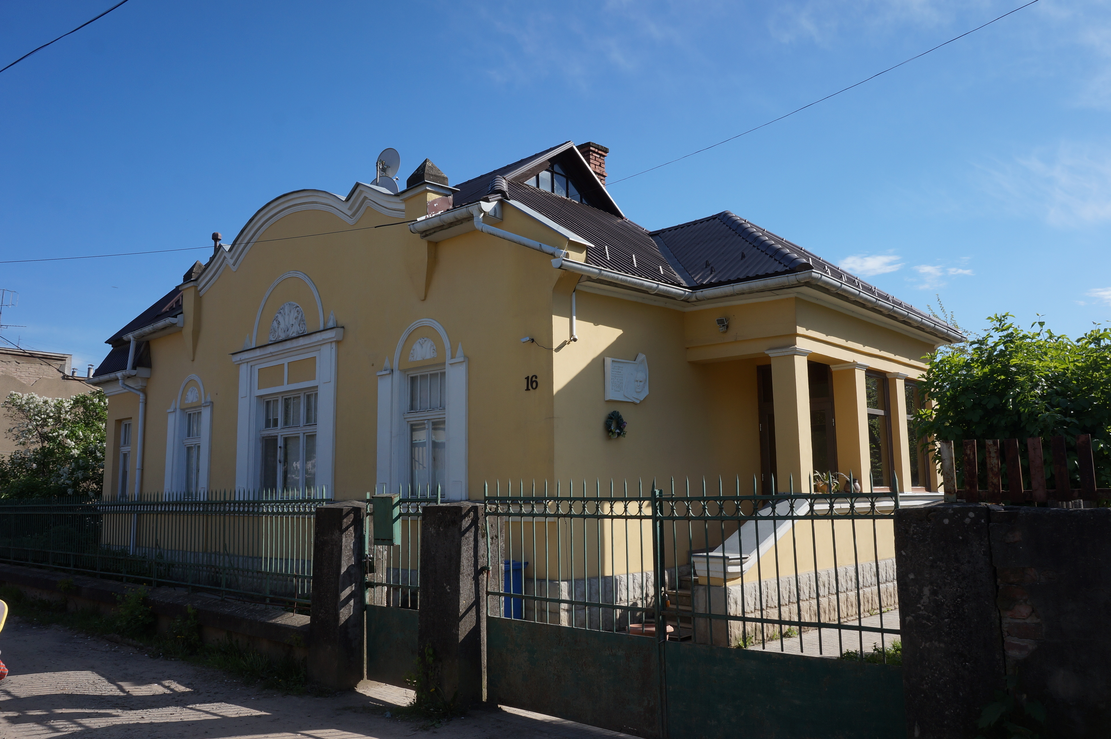 Будинок, в якому жив і працював З. Шолтес — заслужений художник УРСР, Ужгород, вул. Кармелюка, 16